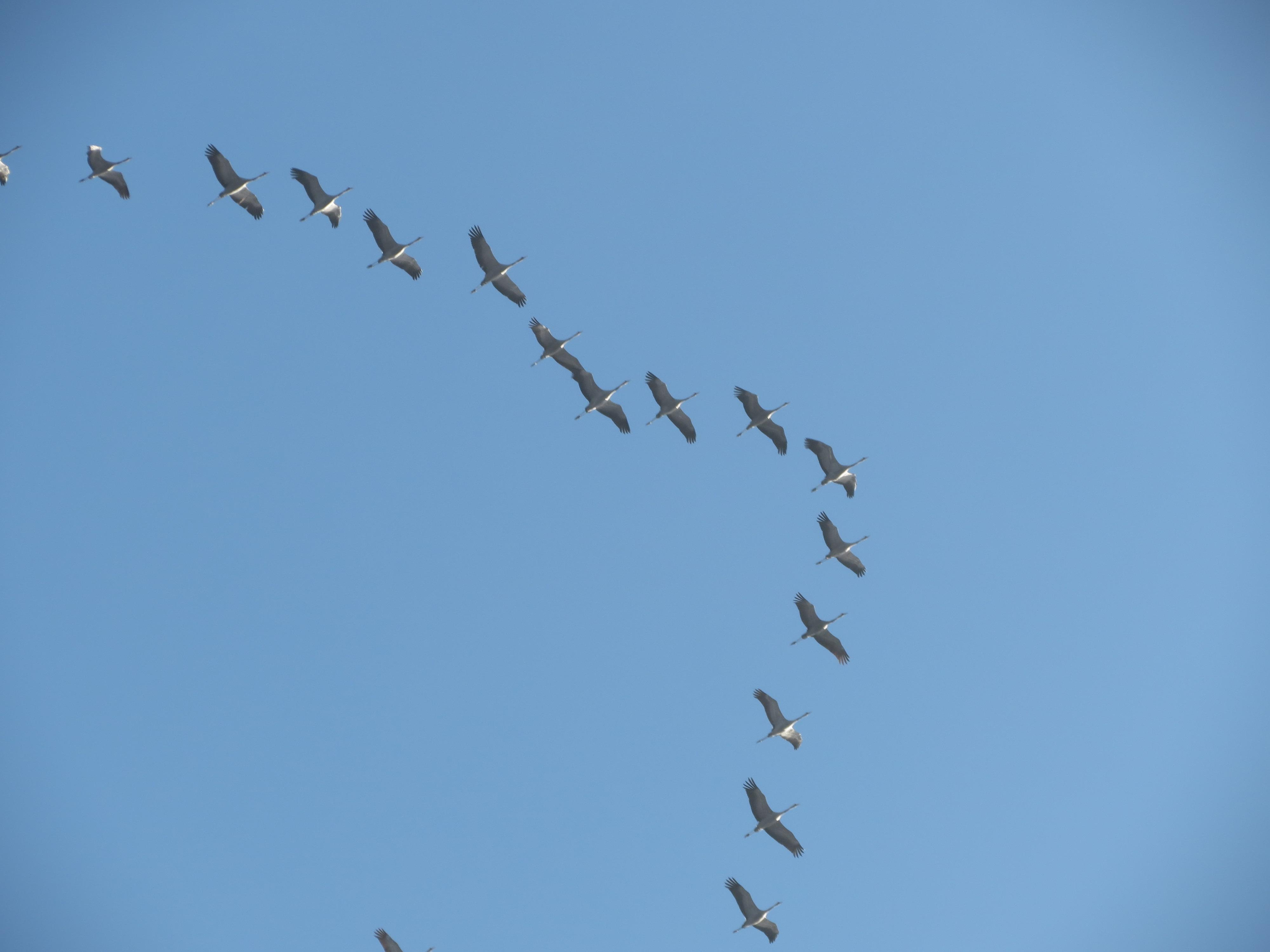 Kraniche über dem Kindel (Nationalpark Hainich).